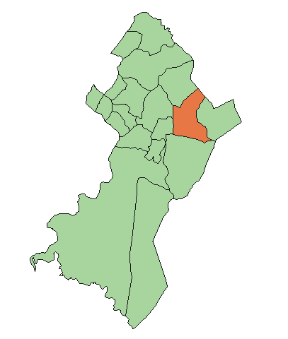 Ubicación de Itauguá.